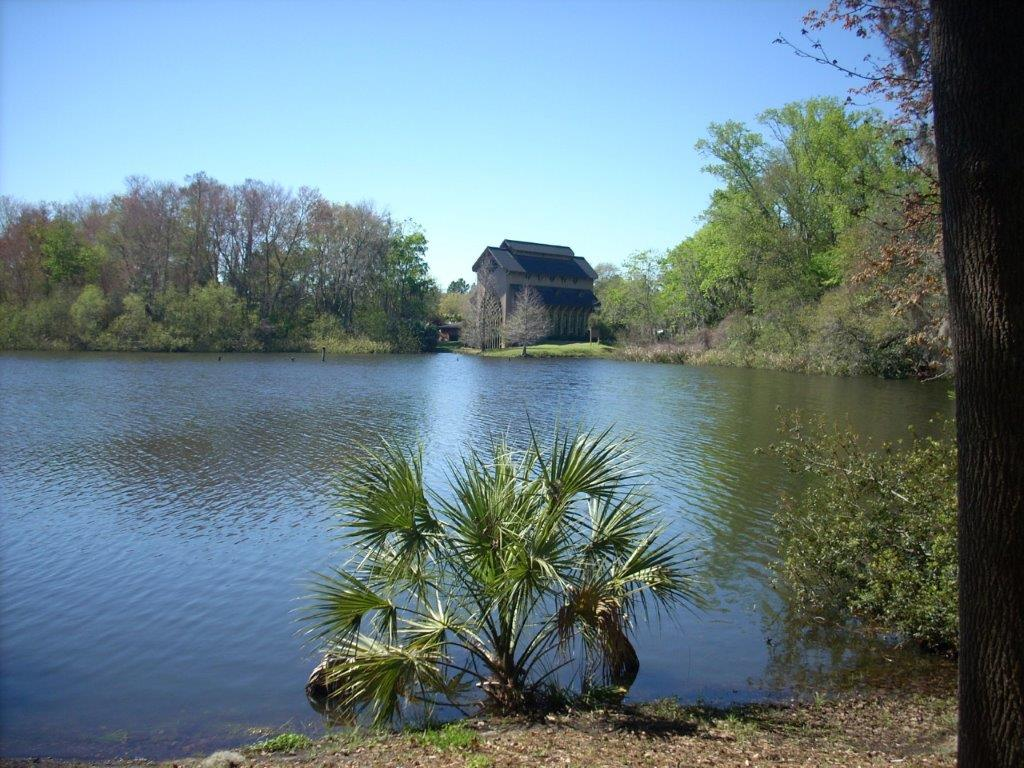 Lake Alice, 2008.